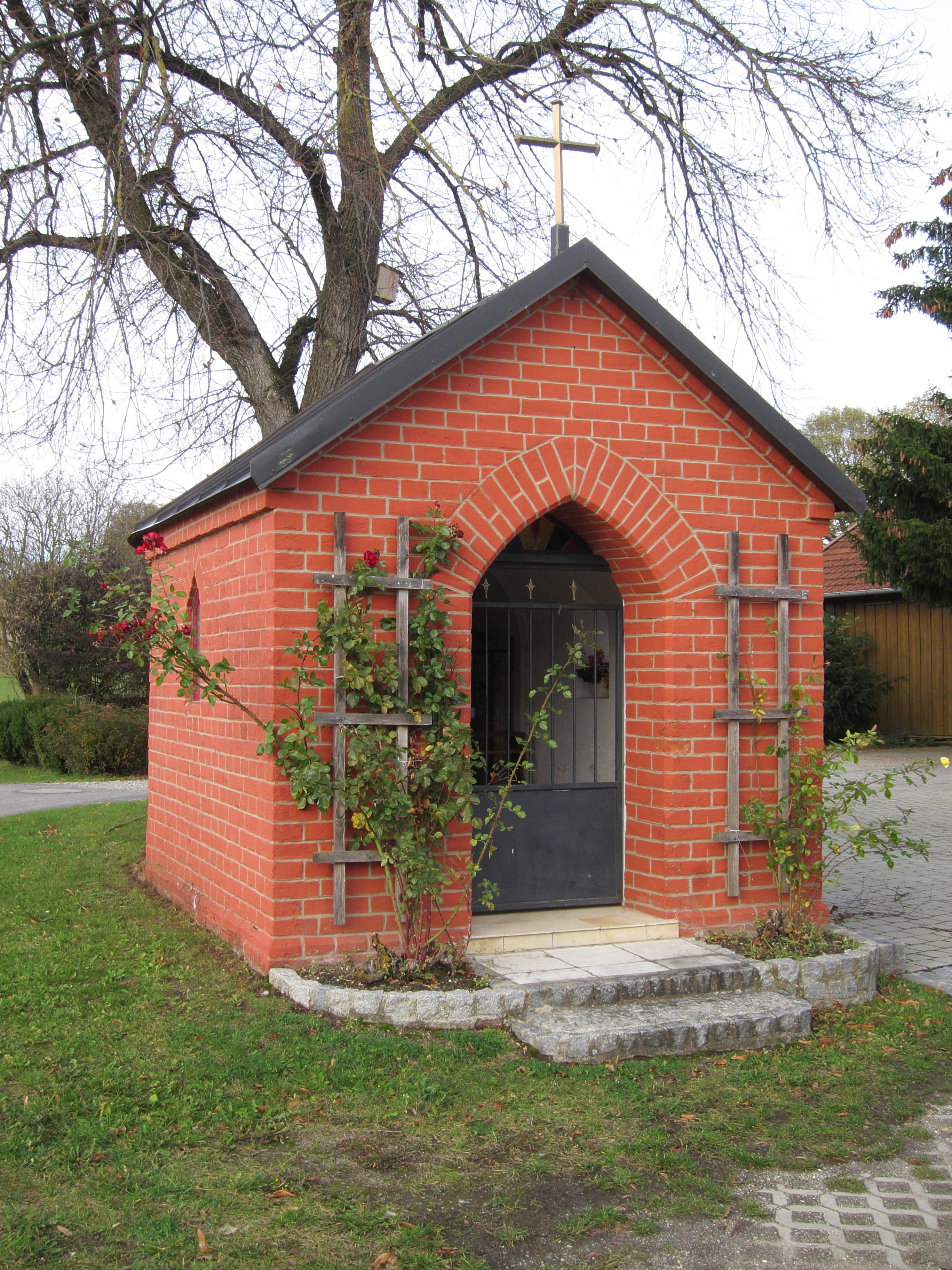 Lourdeskapelle, schlichter Backsteinbau, 1898.